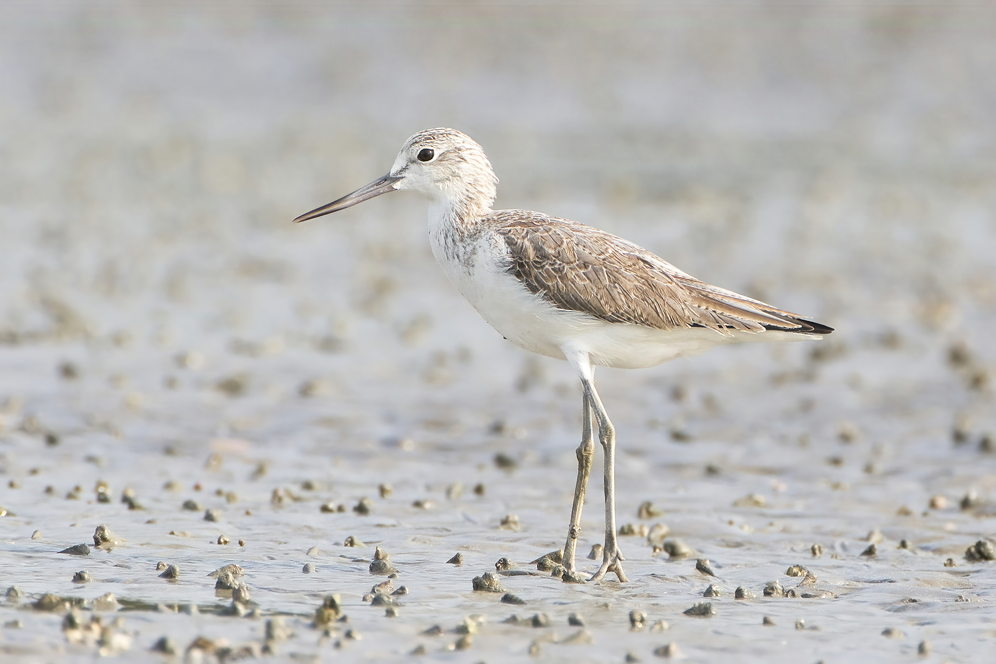 Common Greenshank (Tringa nebularia), Laem Phak Bia, Ban Laem, Phetchaburi, Thailand